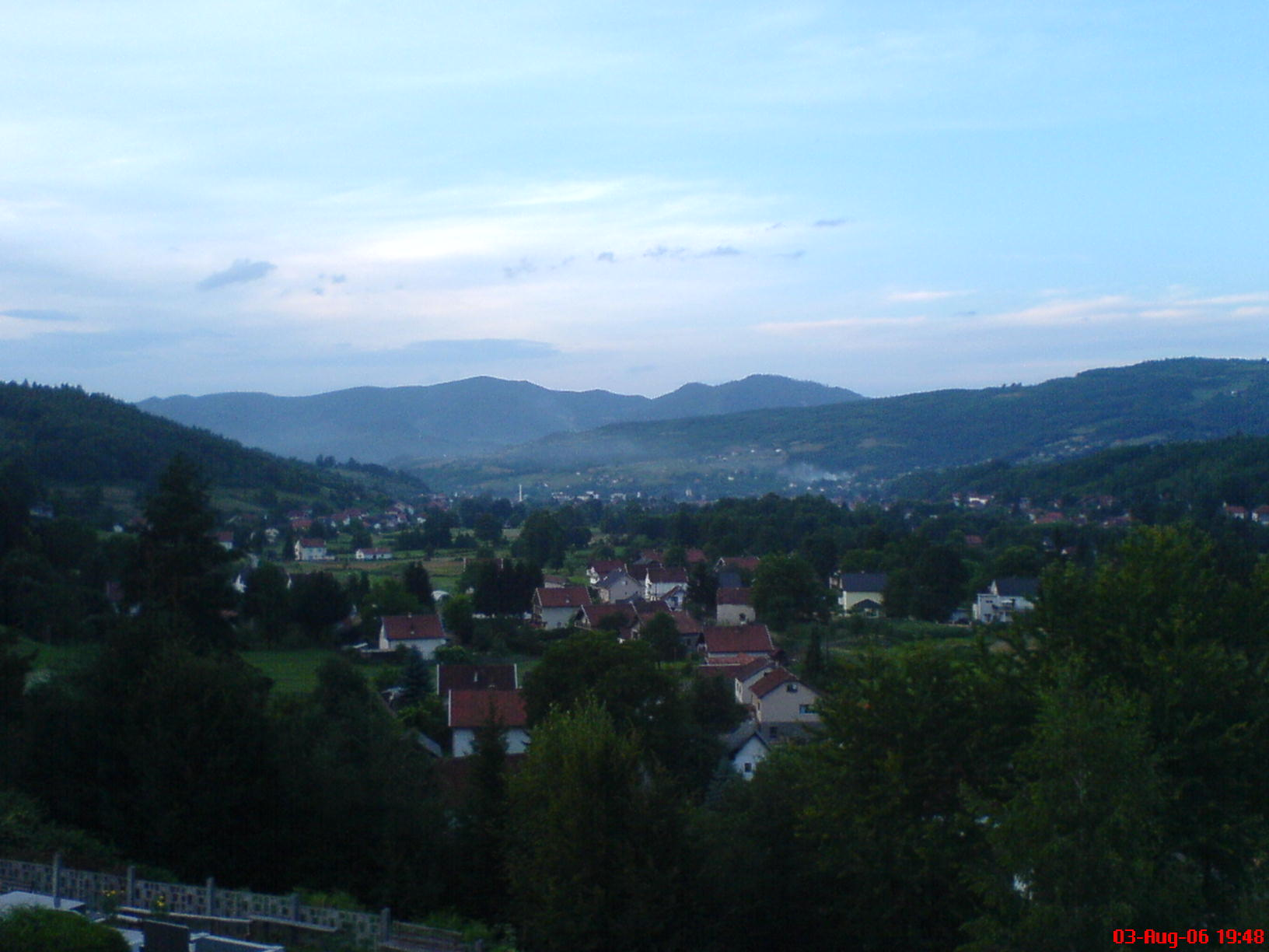 Deze foto heb ik zelf genomen op 3 augustus 2006 met mijn mobiele telefoon (Sony Ericsson W810i).